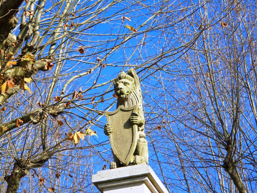 Léon de piedra sosteniendo el escudo de la ciudad de Pontevedra